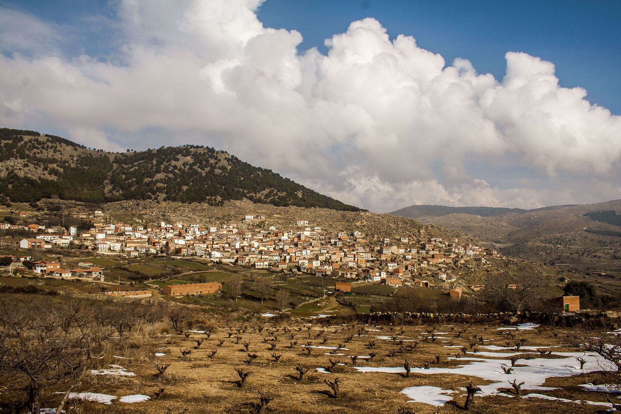 VIsta de San Juan de la Nava